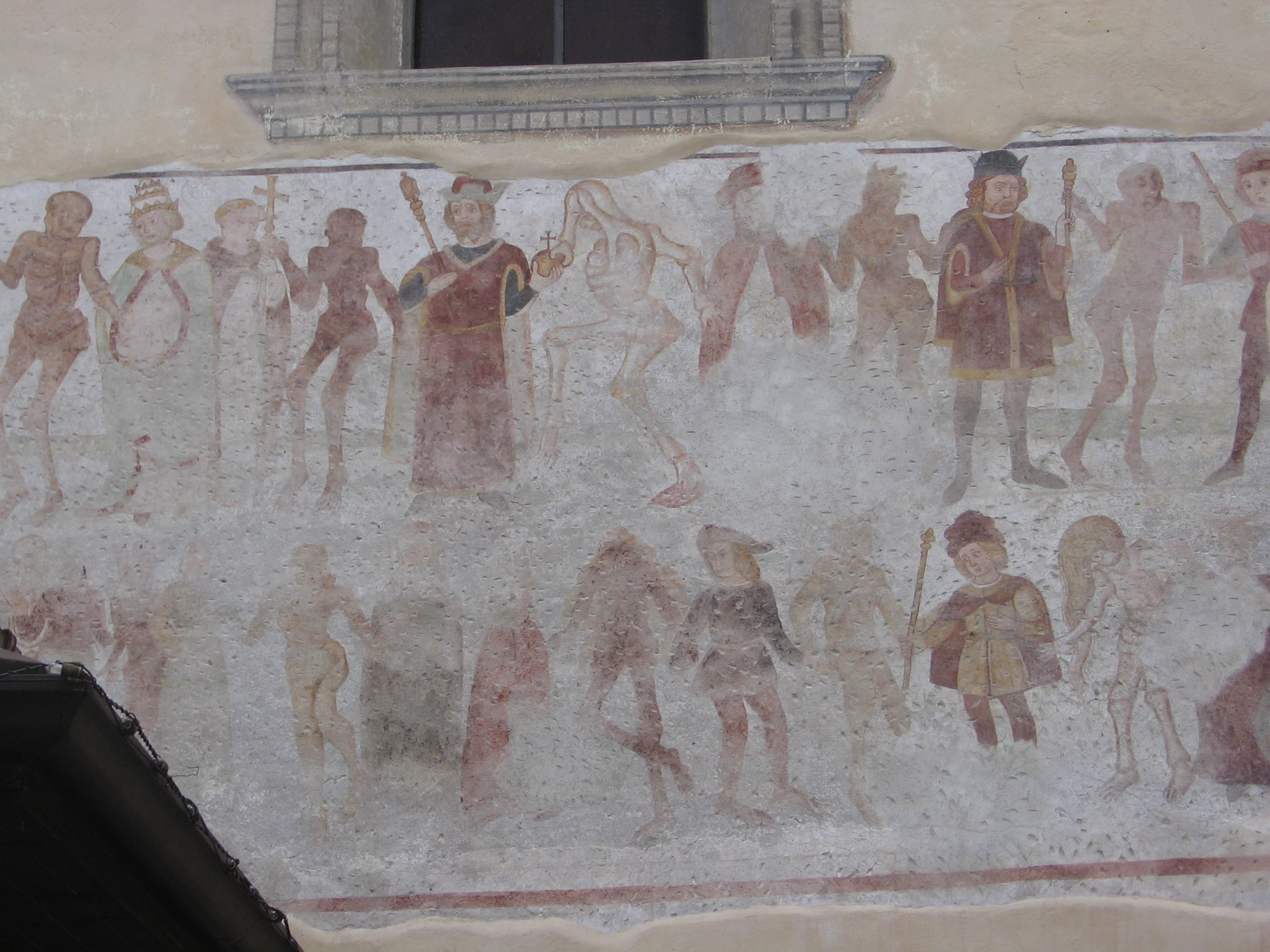 Cassiglio, Bergamo, Italy